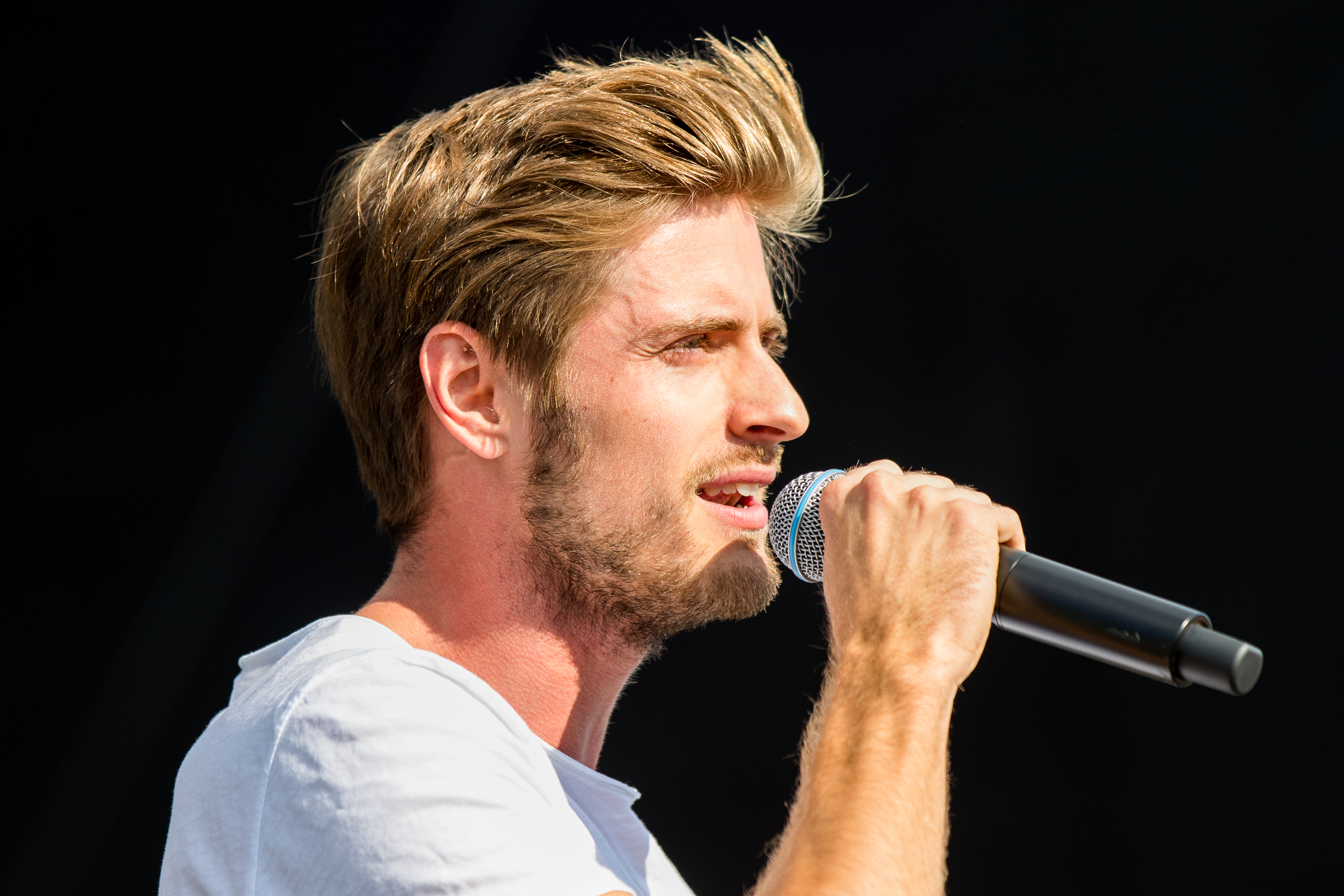 Jörn Schlönvoigt during La Ola Mannheim at Maimarktgelände, Mannheim, Baden Württemberg, Germany on 2016-07-09, Photo: Sven Mandel